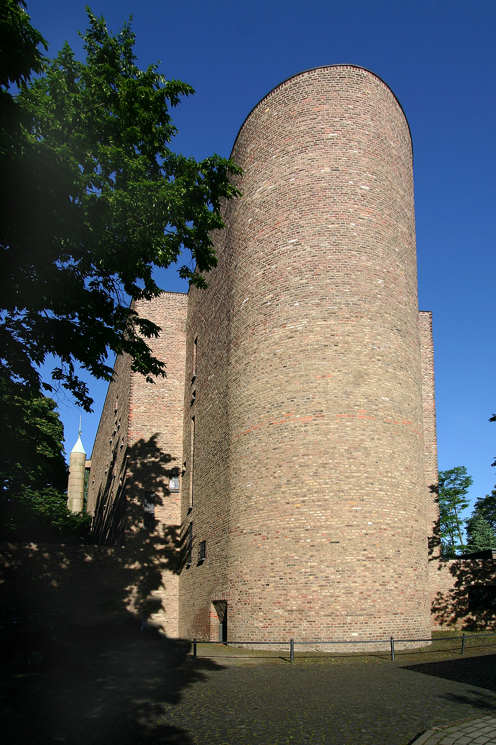 Neu St. Alban in Köln, Chorseite